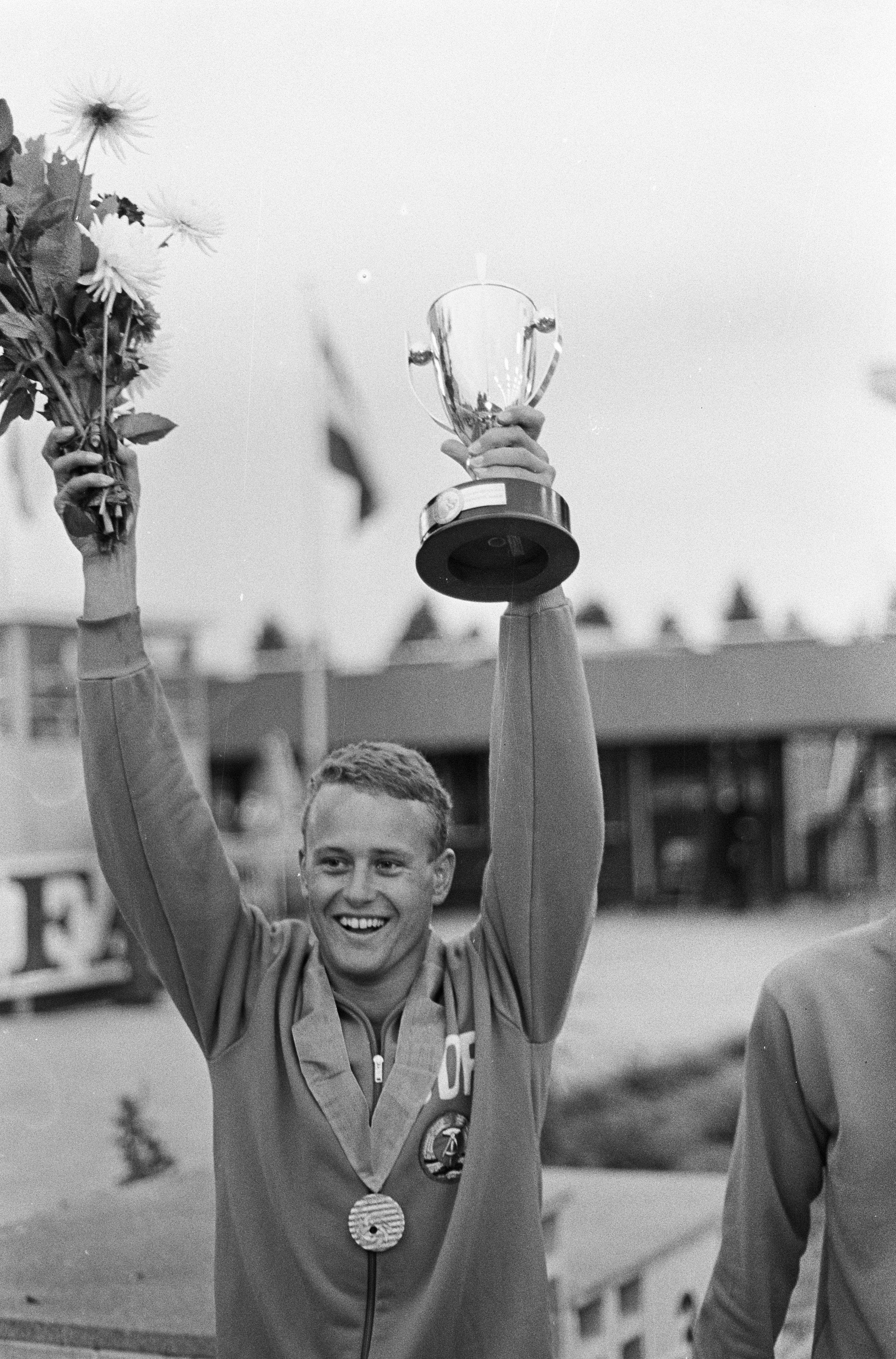 Collectie / Archief : Fotocollectie Anefo Reportage / Serie : [ onbekend ] Beschrijving : Europese Zwemkampioenschappen, 4 x 100 meter vrije slag heren Datum : 27 augustus 1966 Trefwoorden : zwemkampioenschappen Fotograaf : Nijs, Jac. de / Anefo Auteursrechthebbende : Nationaal Archief Materiaalsoort : Negatief (zwart/wit) Nummer archiefinventaris : bekijk toegang 2.24.01.05 Bestanddeelnummer : 919-4974